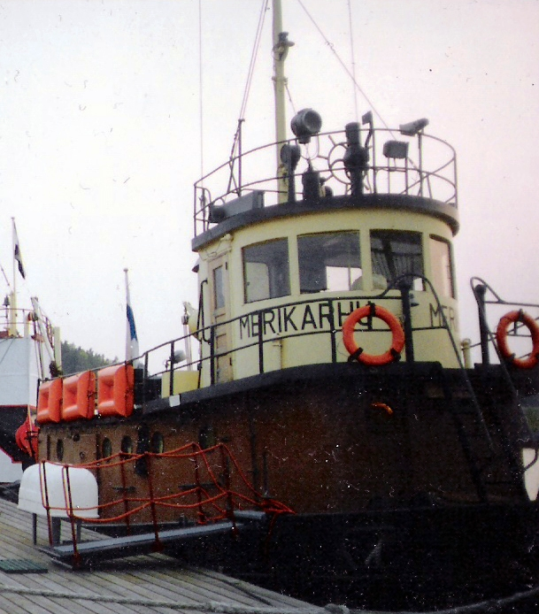 entinen DR-hinaaja, nykyinen museolaiva m/s MERIKARHU Haminan laiturissa